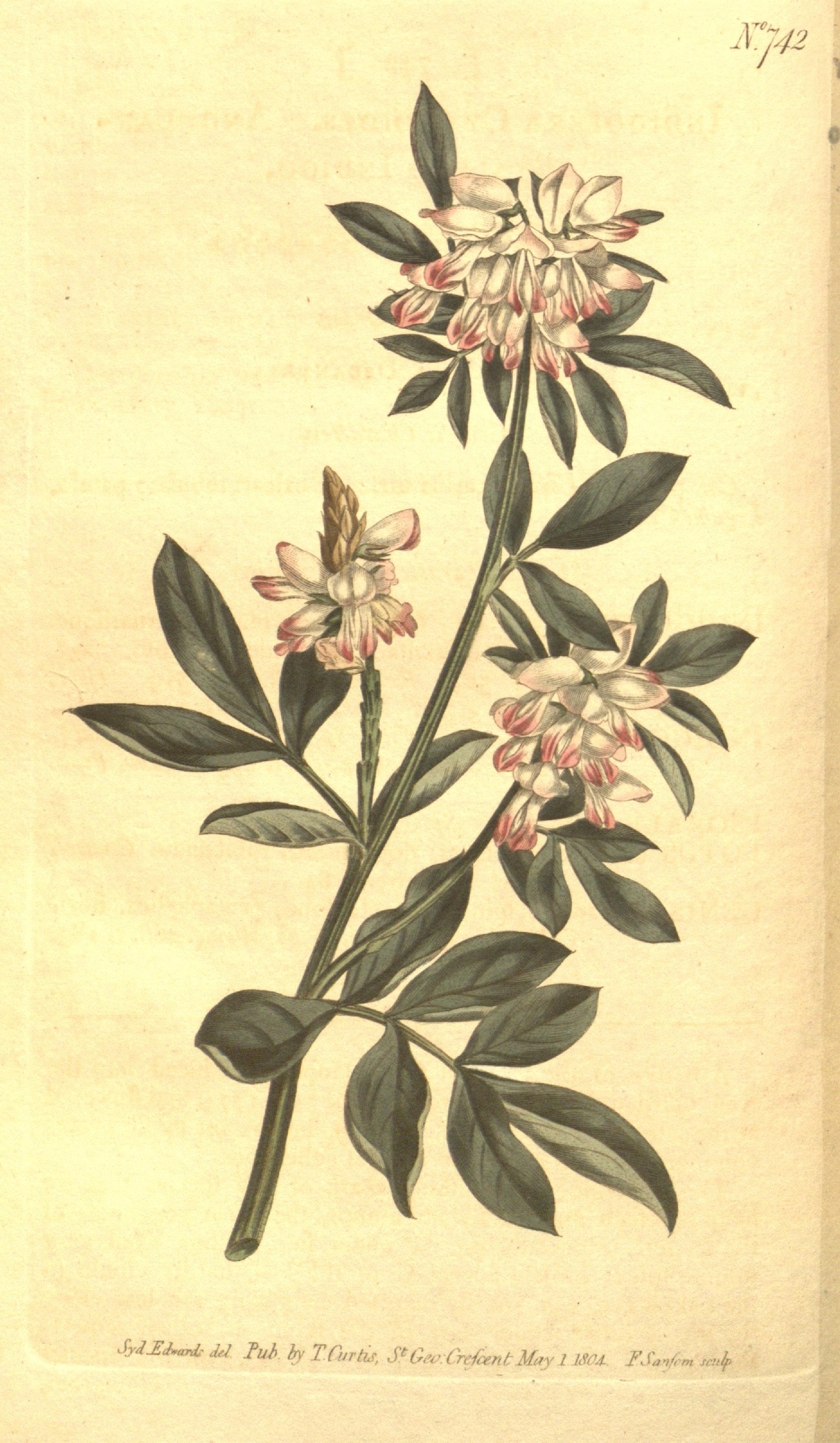 V742 SyiJEAmnb del Tub fo TO